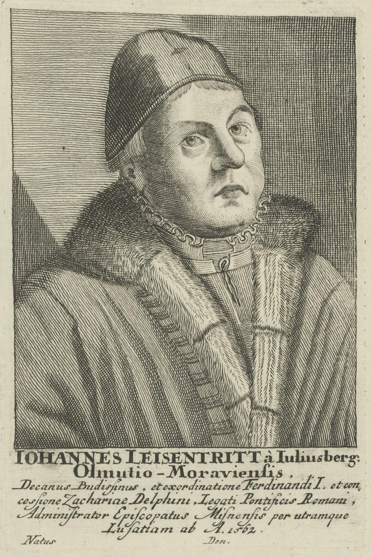 Johann Leisentrit. Kupferstich, Museum Bautzen, Inv. Nr.: R 10481. In: Zwischen Katheder Thron und Kerker. Leben und Werk des Humanisten Caspar Peucer. Museum Bautzen, 2002, S. 179